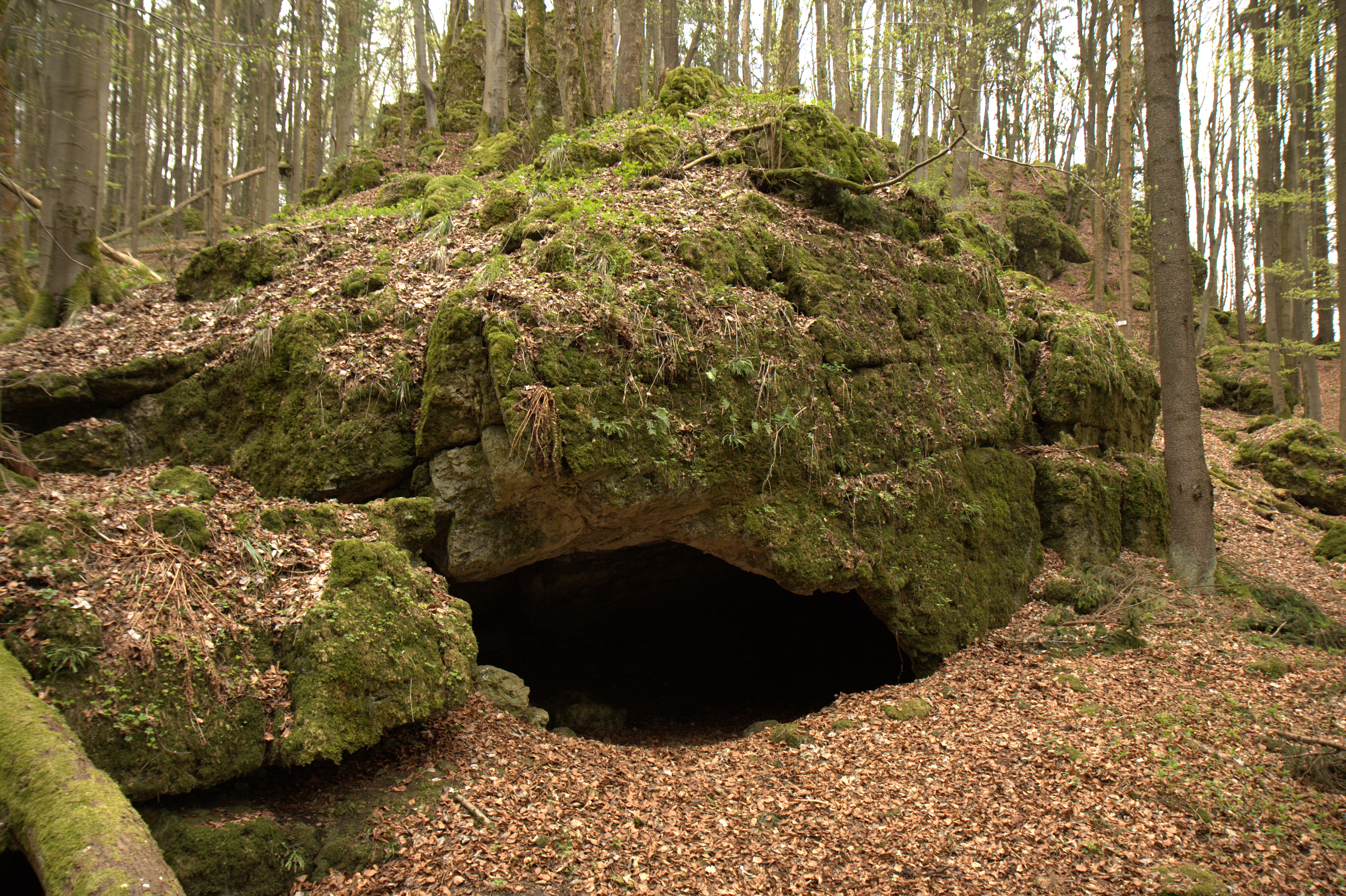 Burgstall Scharfenberg - Höhle mit Mauerresten unter dem Burgstall